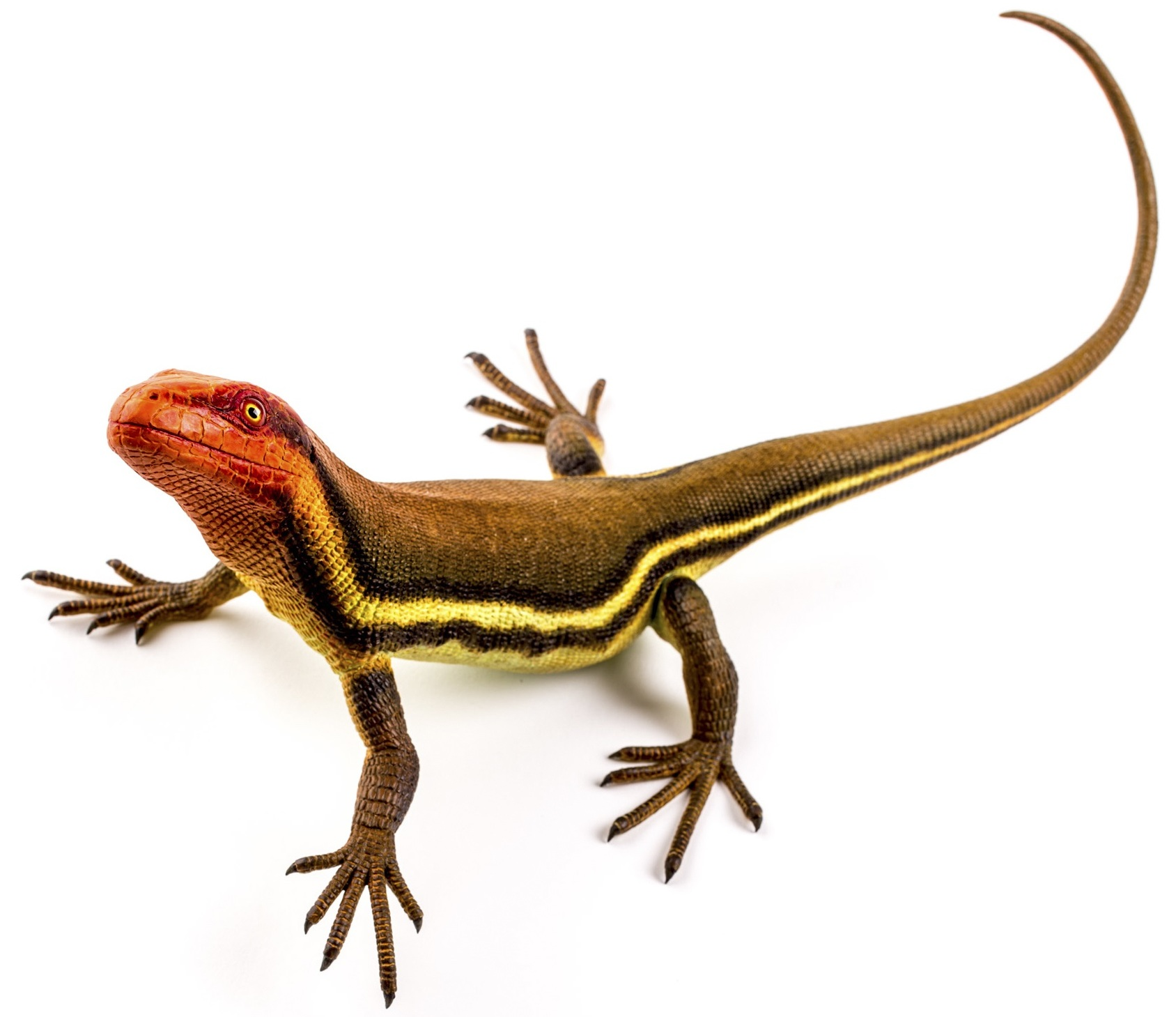 Una ricostruzione di ilonomo in scala 3:1.